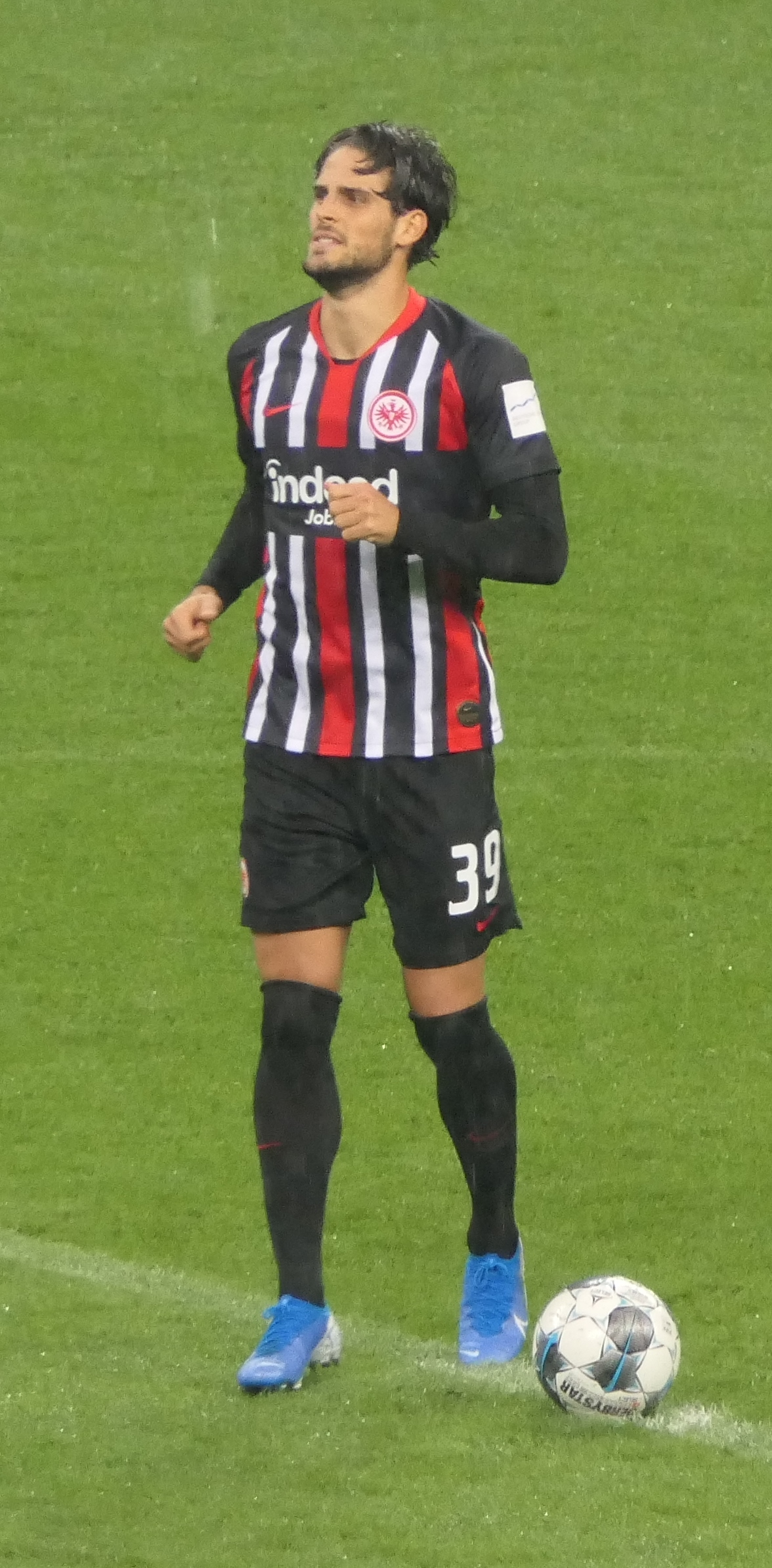 Der Fussballprofi Gonçalo Paciência im Trikot von Eintracht Frankfurt beim Heimspiel gegen den SV Werder Bremen am 06.10.2019.